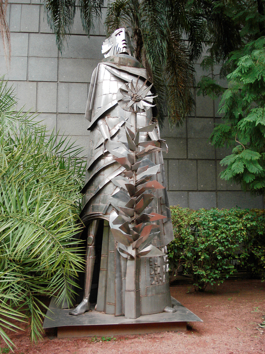 Tiradentes, obra de Vasco Prado nos jardins externos da Assembléia Legislativa do RS, Porto Alegre, Brasil.